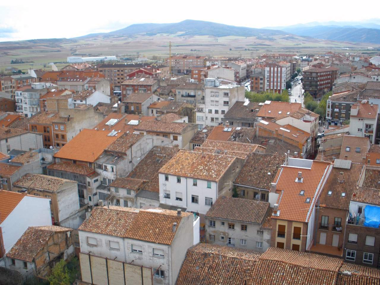 Vista de la localidad desde la torre catedralicia de Santo Domingo de la Calzada (La Rioja)